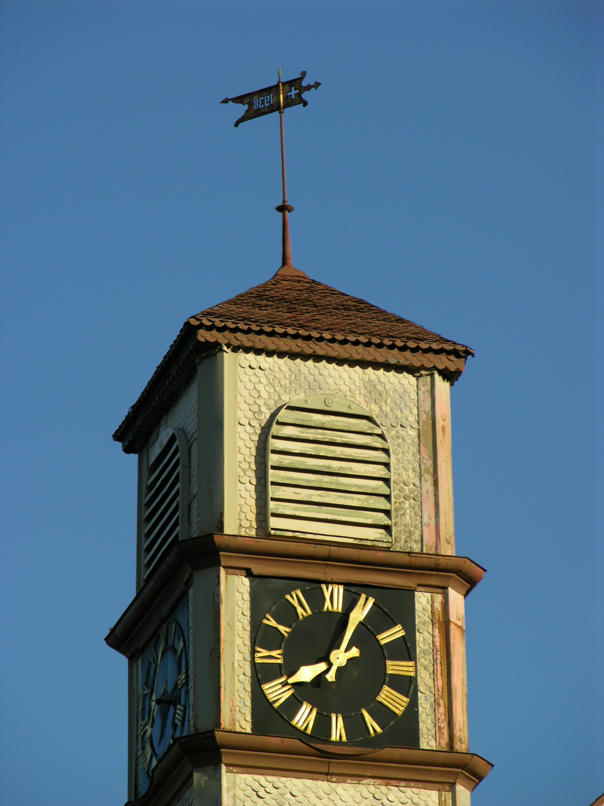 Küttigen: Turm des "Türmlischulhauses" im Dorf